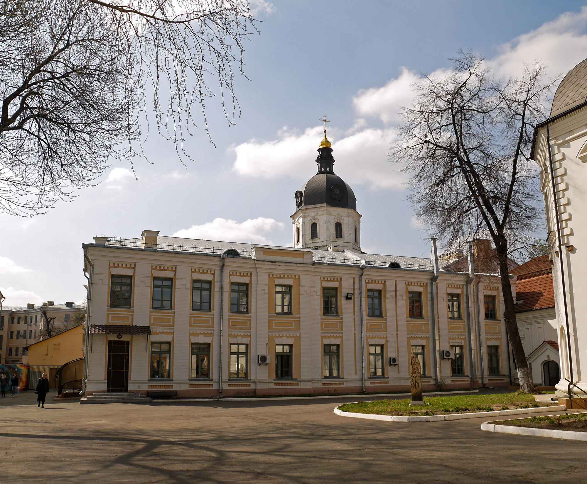 Будинок лікарні, архіву канцелярії та залу засідань Ради Києво-Могилянської академії, Київ, Сковороди Григорія вул., 2